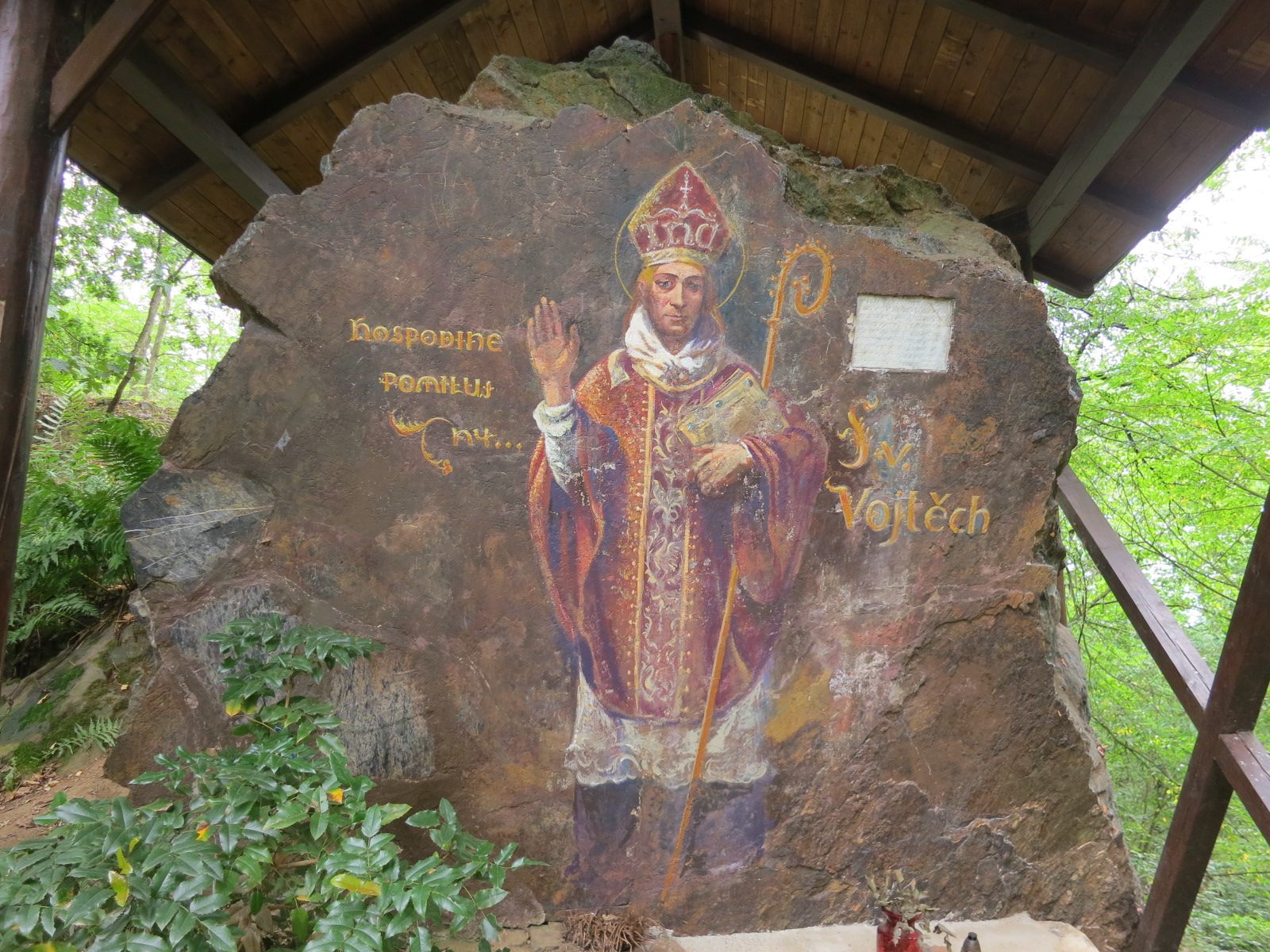 Skalní obraz svatého Vojtěcha na Ticholovci